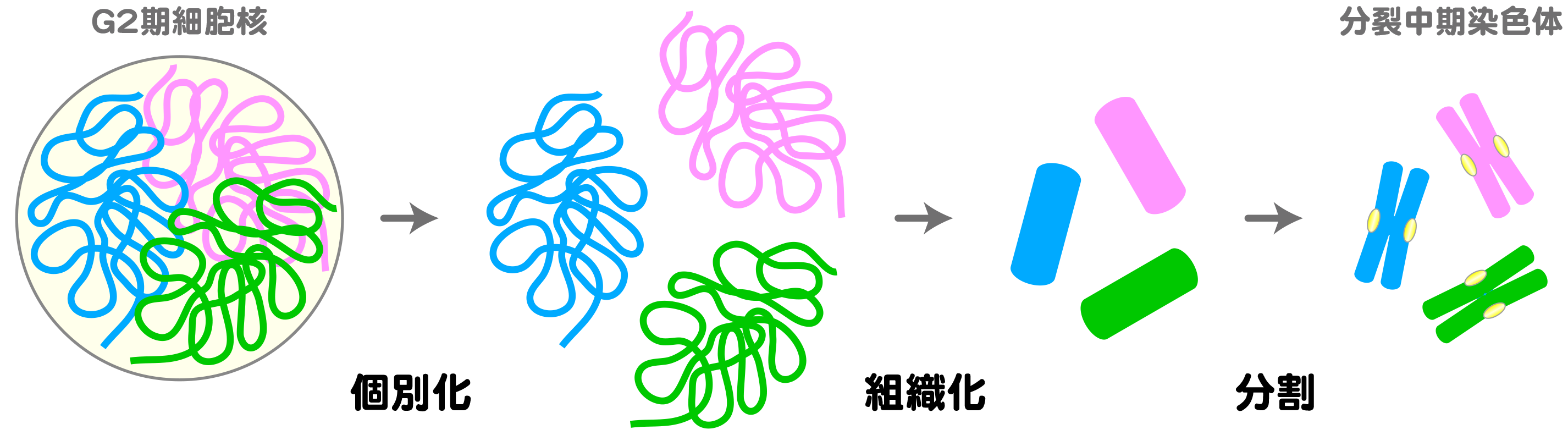 染色体凝縮の概念図